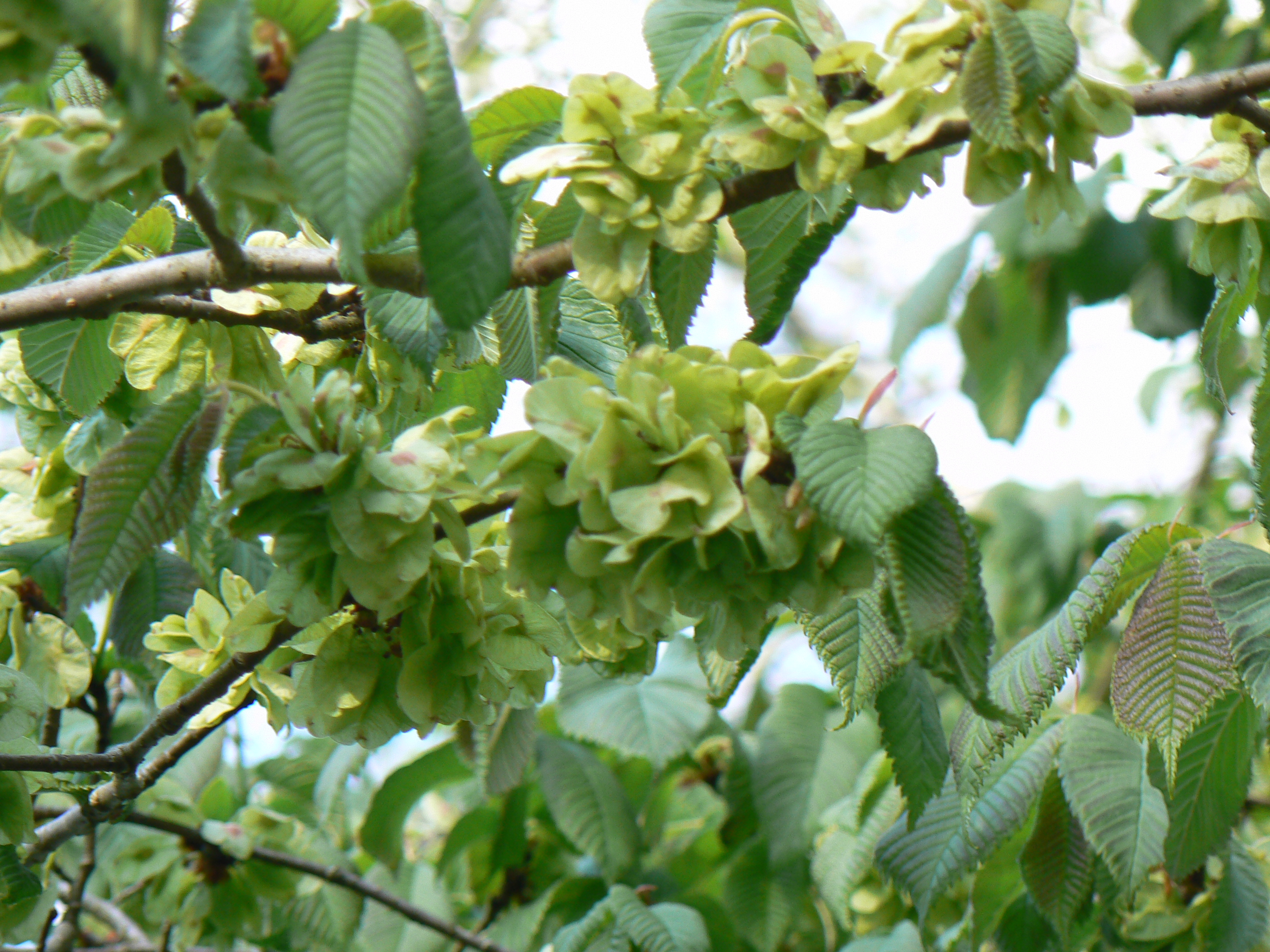 Nezralá semena na větvičce jilmu horského v okrese Šilalė